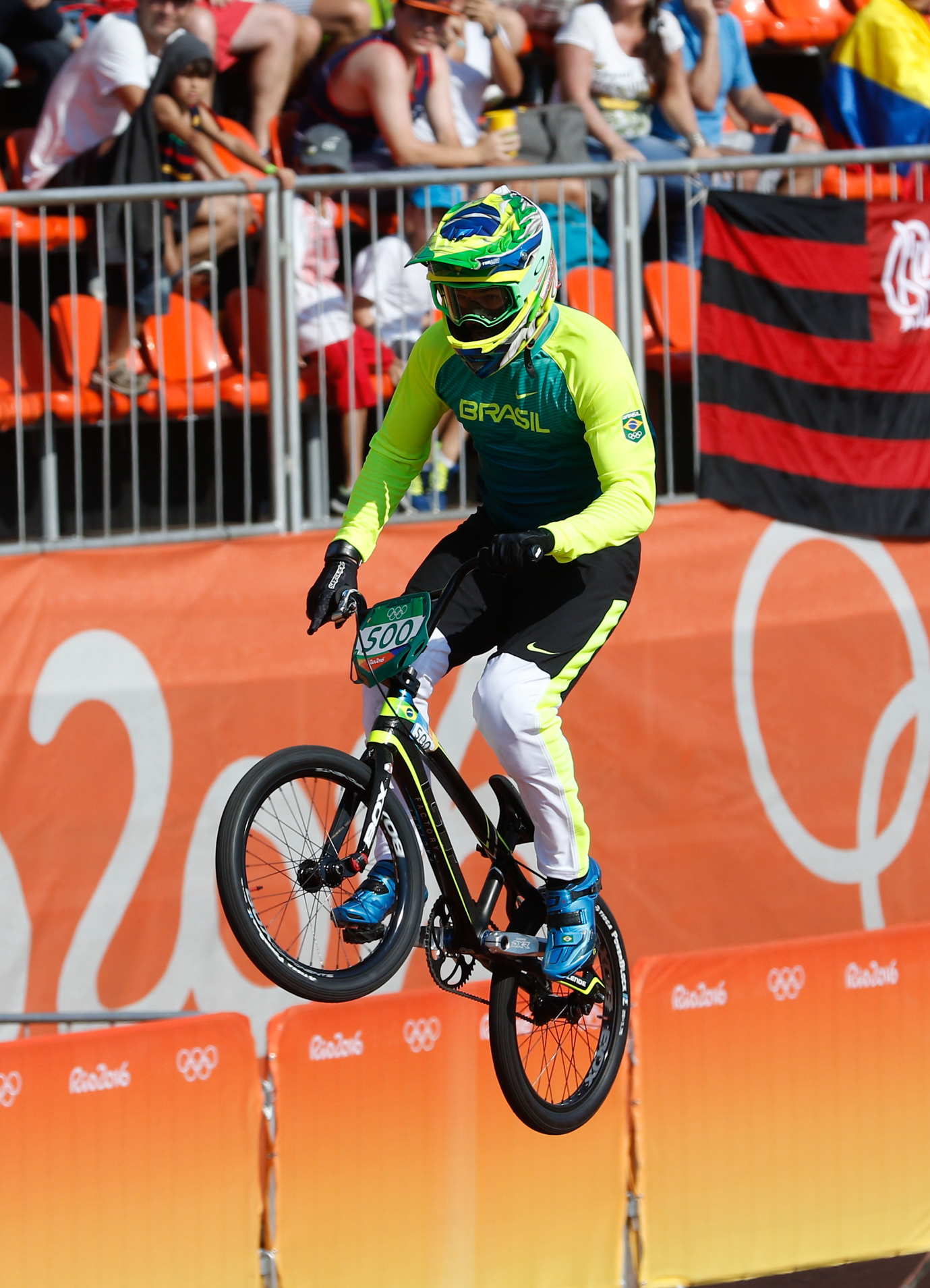 Rio de Janeiro - Ciclista brasileiro Renato Rezende compete BMX nos Jogos Olímpicos Rio 2016, no Parque Radical em Deodoro (Fernando Frazão/Agência Brasil)